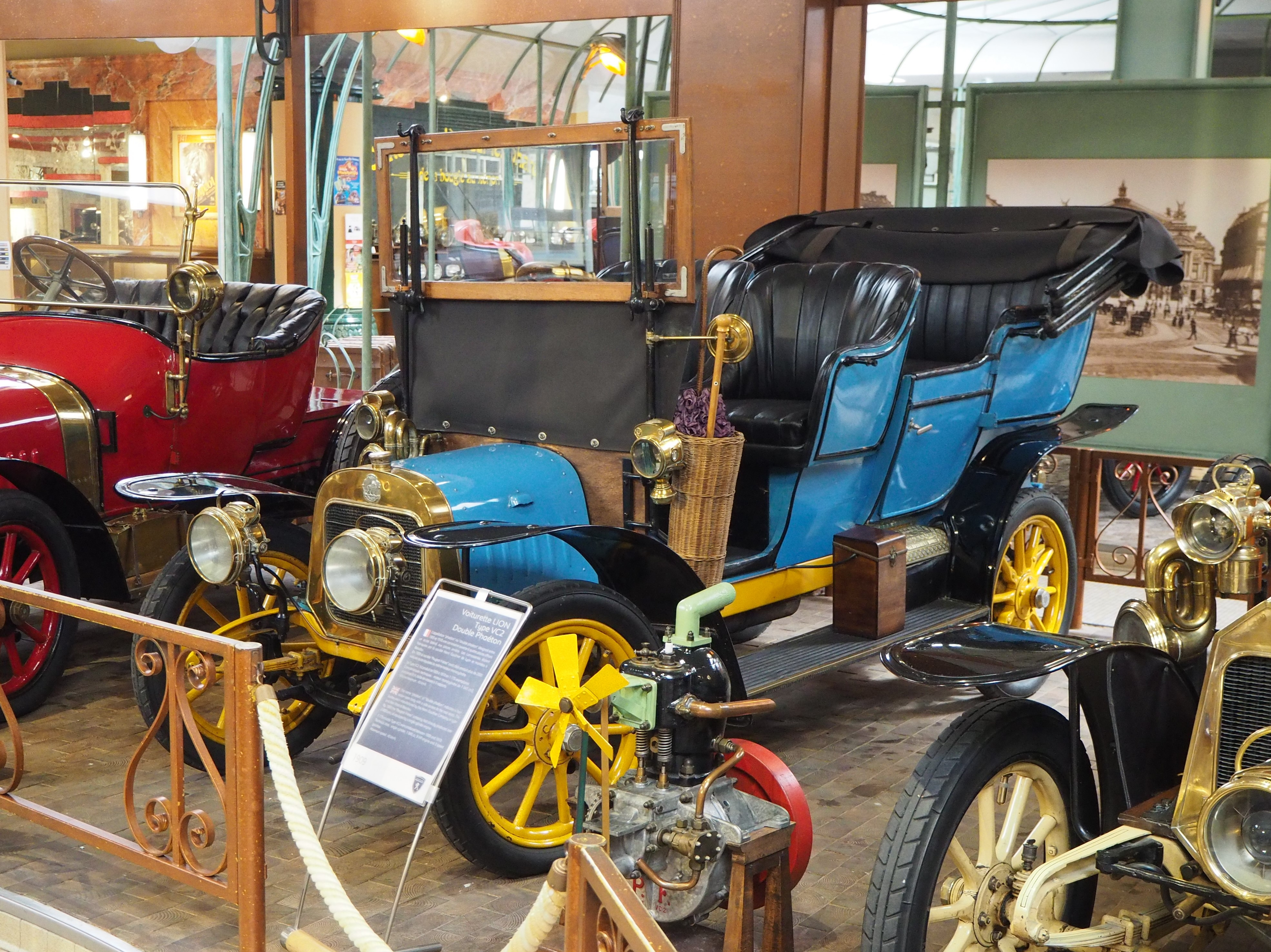 1909 Lion-Peugeot VC2